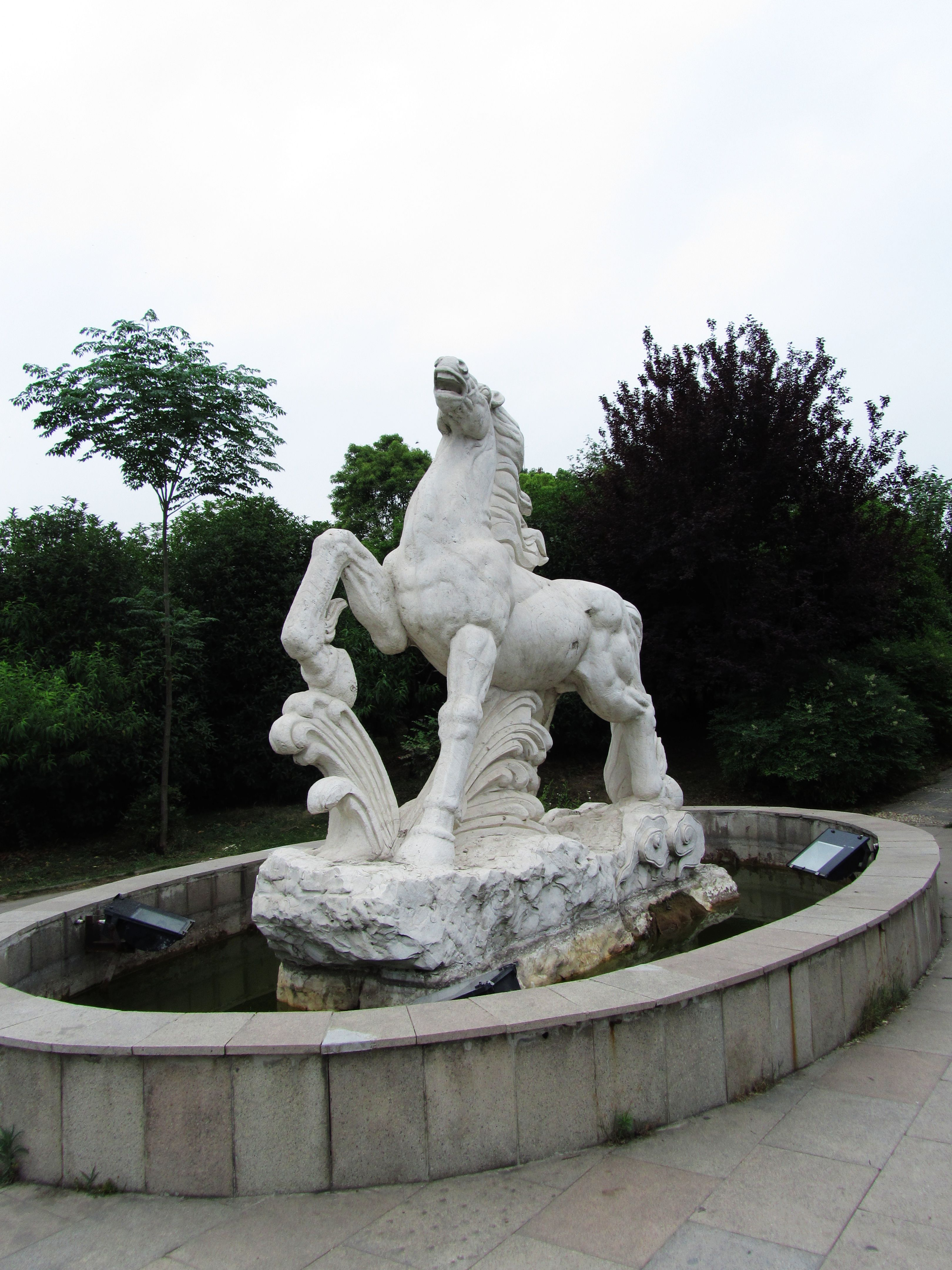 南京白马公园主题雕塑。